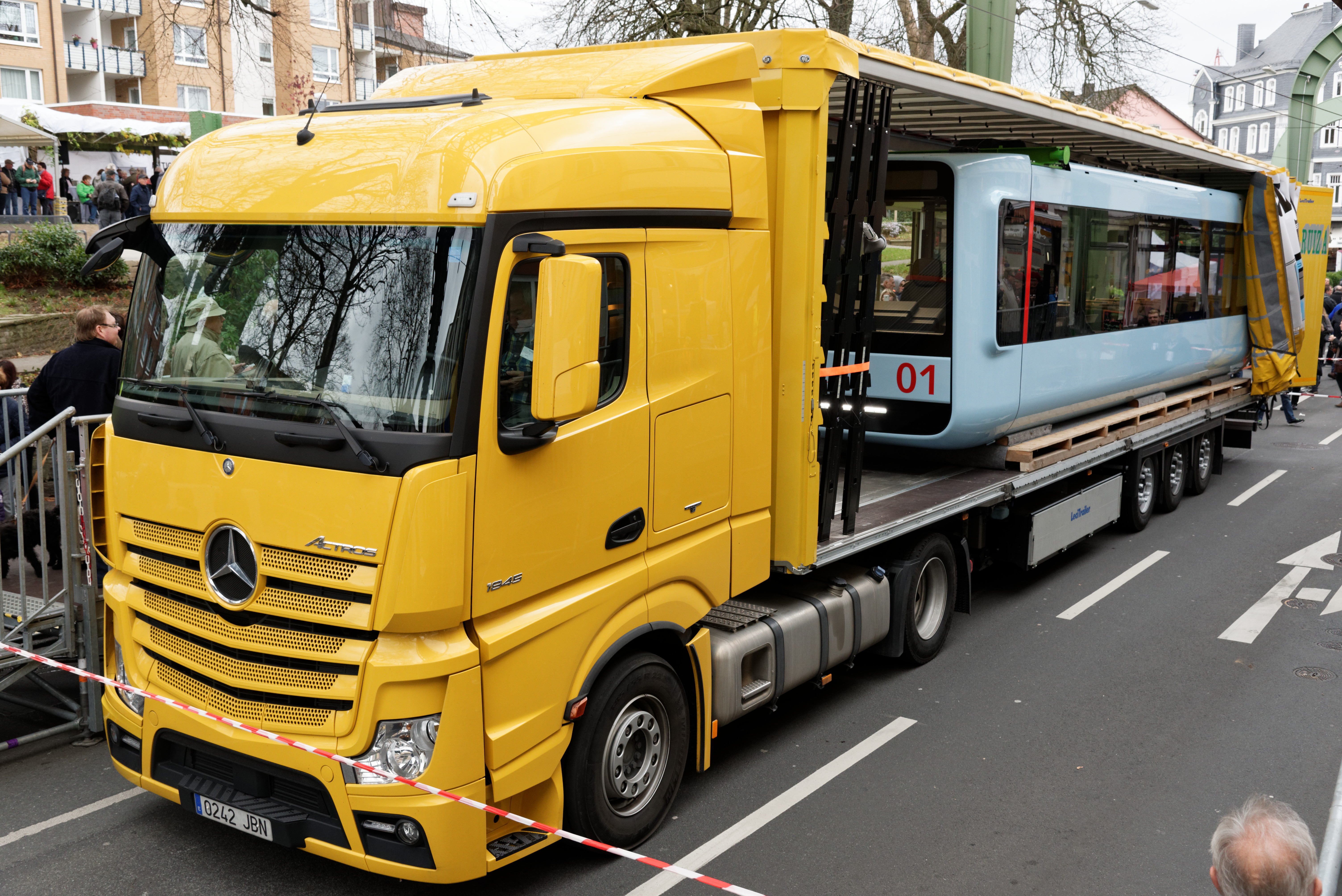 LKW mit neuer Schwebebahn in Wuppertal